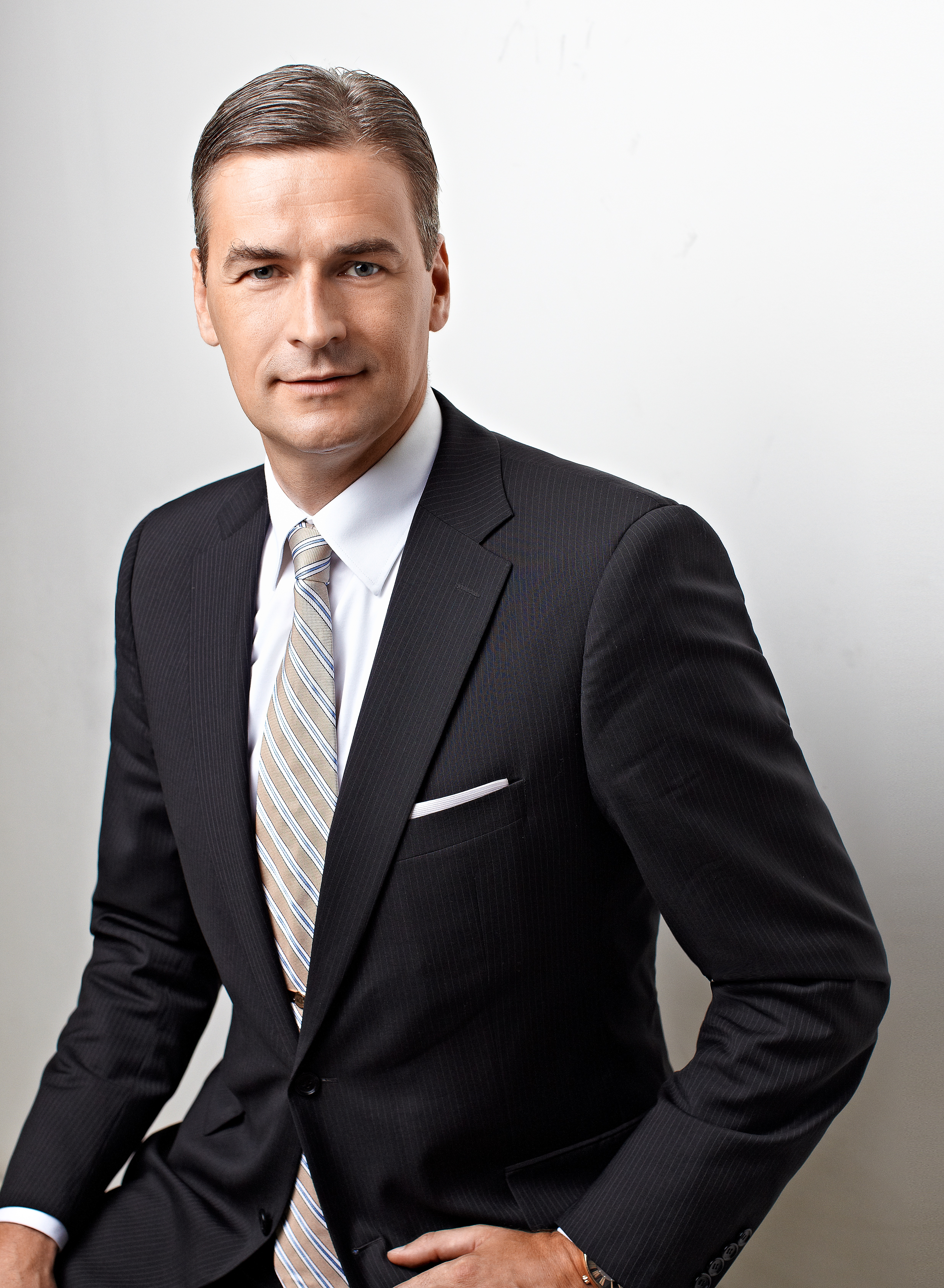 2014.gada 9.decembris. 12.Saeimas deputāts Mārtiņš Bondars.